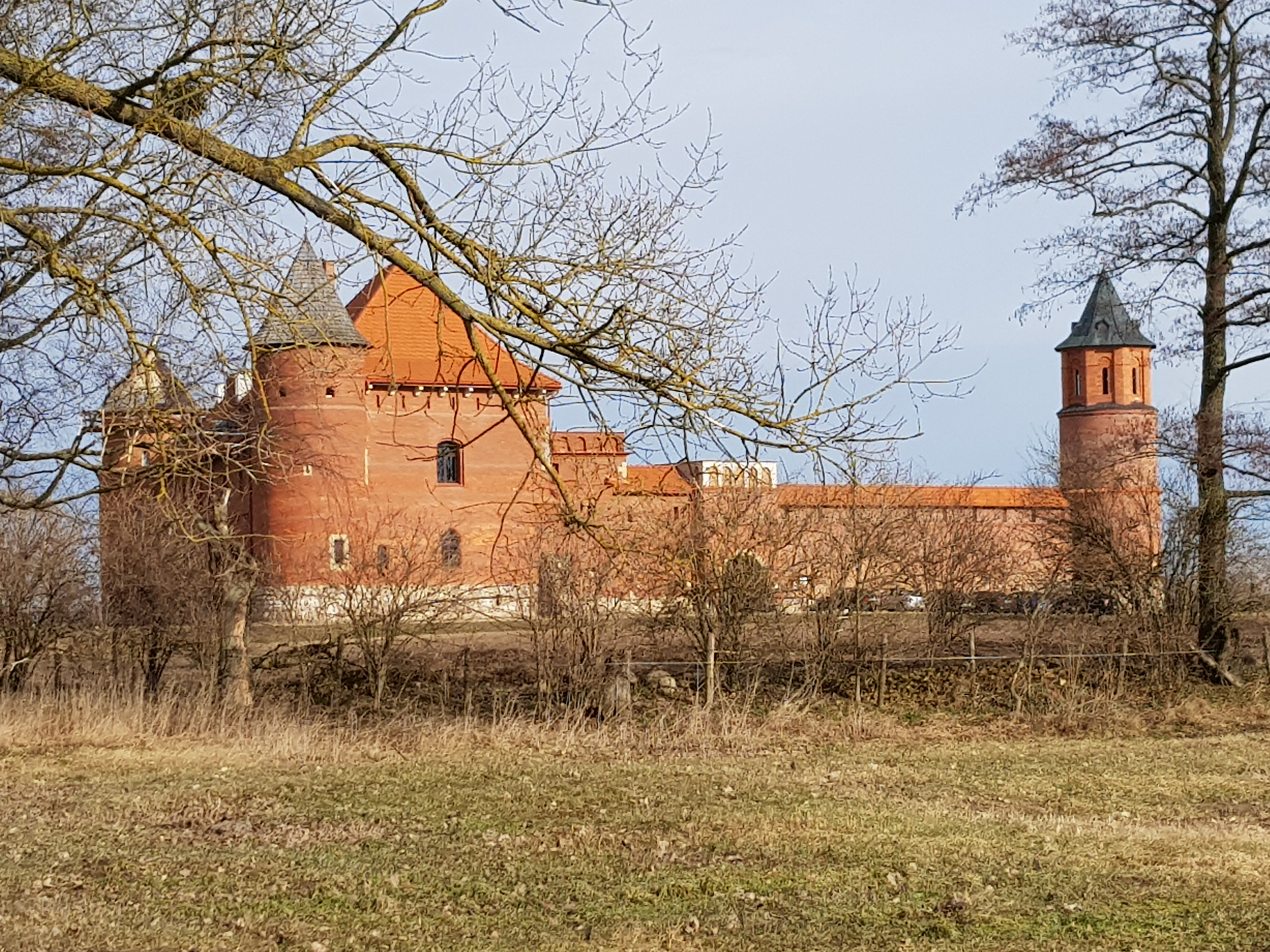 Widok zamku w Tykocinie od strony bramy wjazdowej.